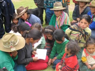 Kečua Indijanci iz grupe Conchucos, Peru Qichwa-Indianer aus Conchucos (Ancash), Peru Kunchuku k'itimanta qhichwa runakuna